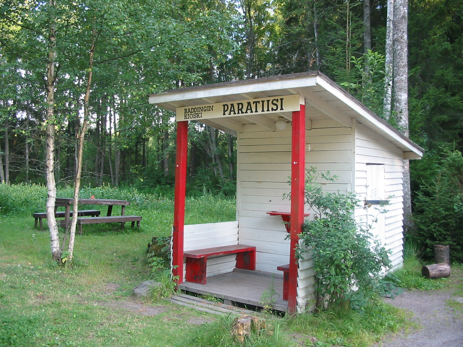 Baddingin kioski Paratiisi Somerolla